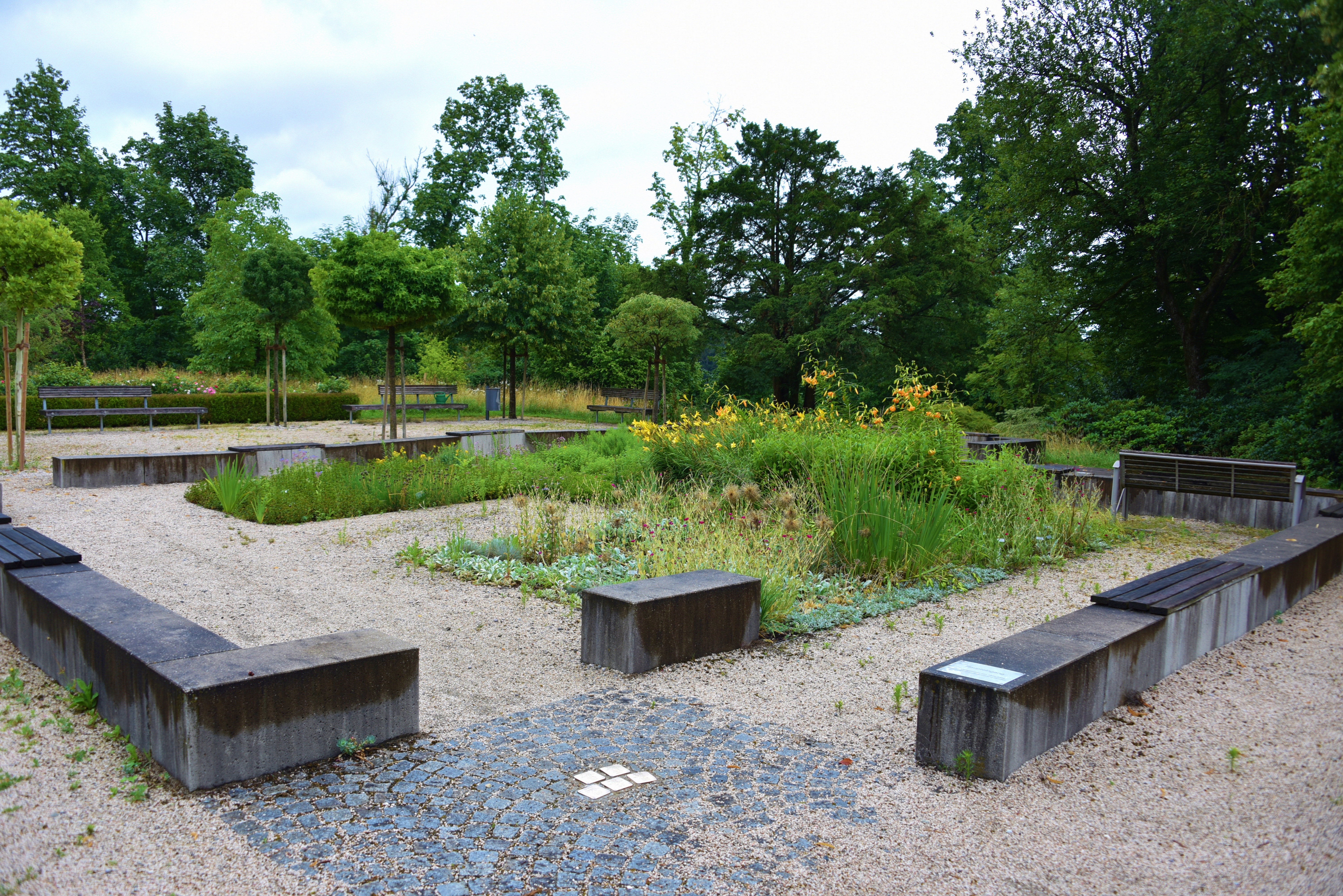 Stolperstein für für die Familie Galitzenstein vor dem Grundriss der ehemaligen Villa Galitzenstein, später Wackerwerk, heute Botanischer Garten